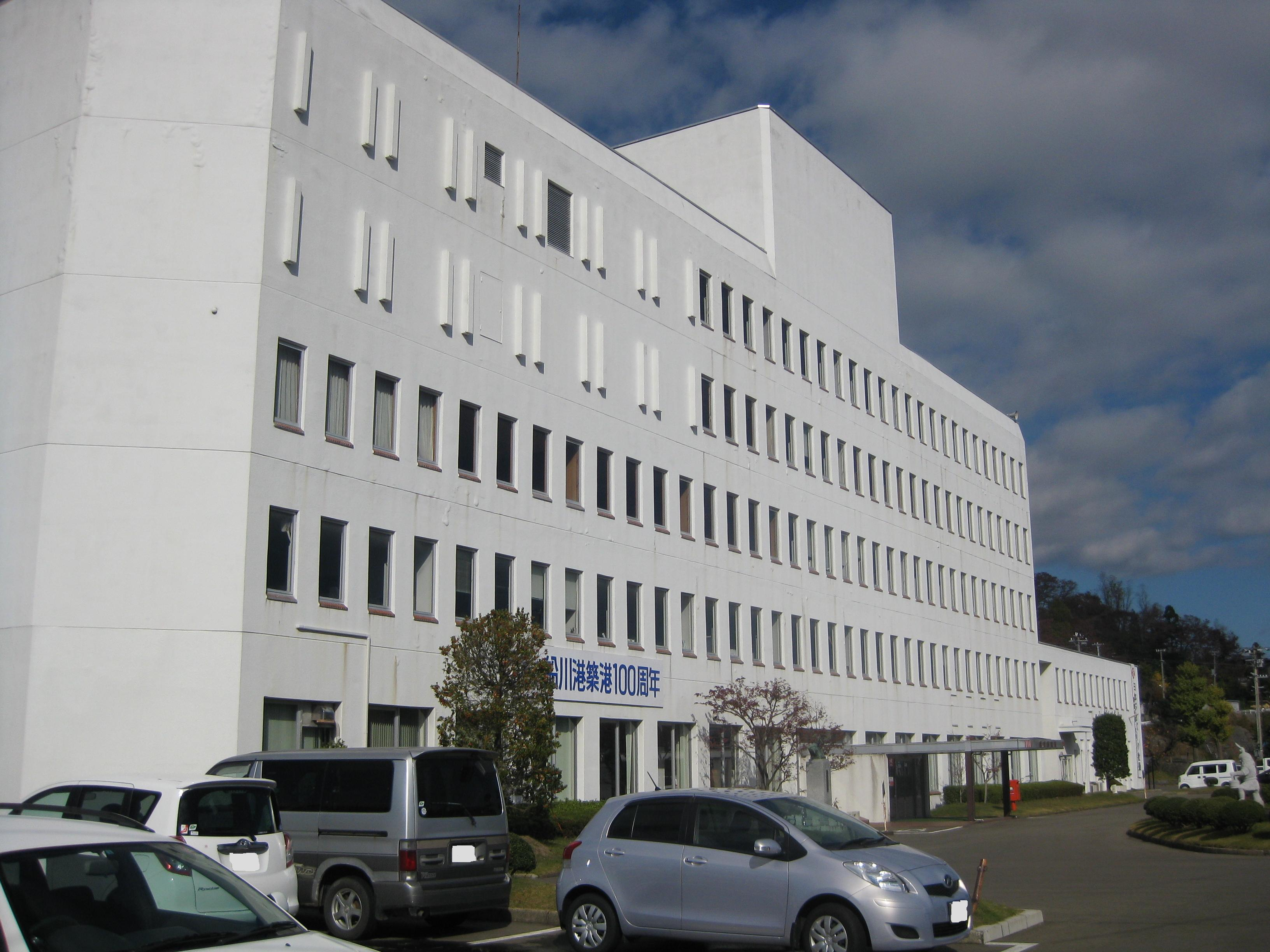 男鹿市役所